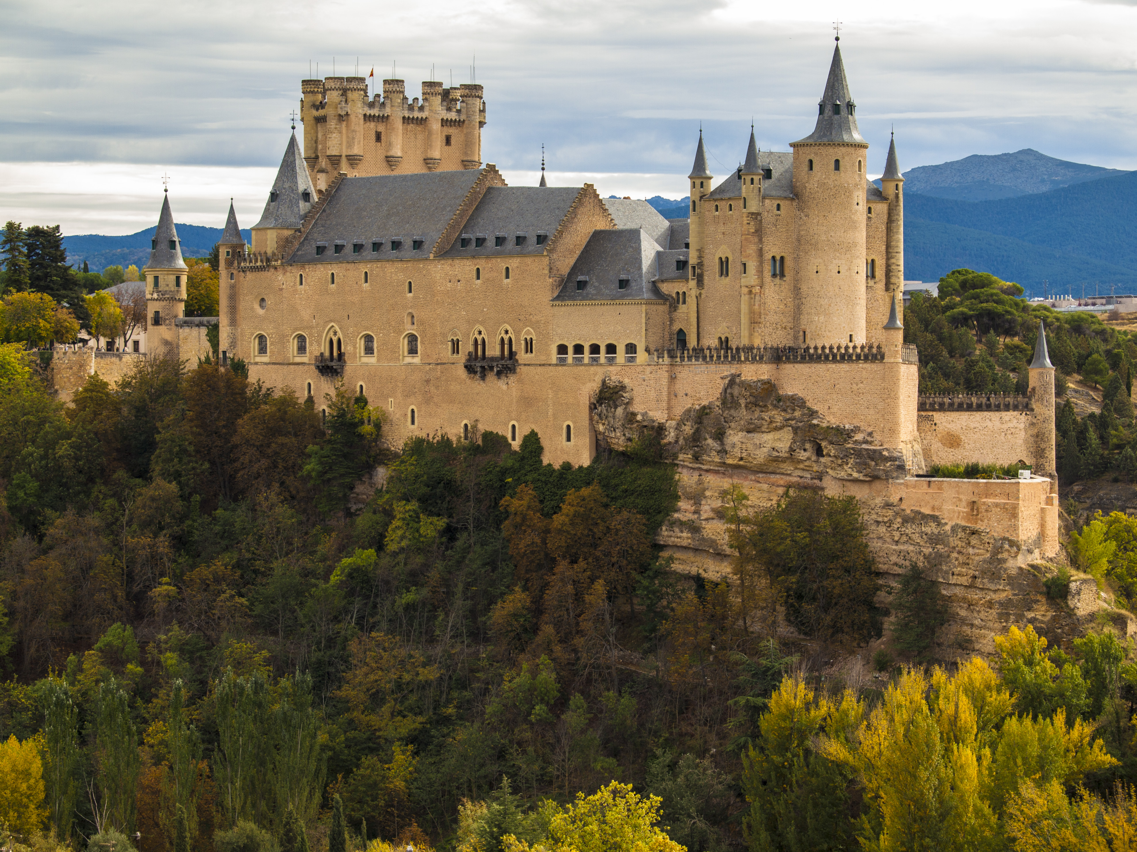 Panorámica en Otoño del Alcázar de Segovia. Alcázar of Segovia (Inventory)Native nameAlcázar de SegoviaParent institutionOld Town of Segovia and its Aqueduct LocationSegovia , (Spain)Coordinates40° 57′ 09″ N, 4° 07′ 58″ W Established1122Web pagealcazardesegovia.comAuthority control : Q557337 VIAF: 237436374 ULAN: 500308864 BIC: RI-51-0000861 GND: 4443101-6 BNE: XX83953 institution QS:P195,Q557337